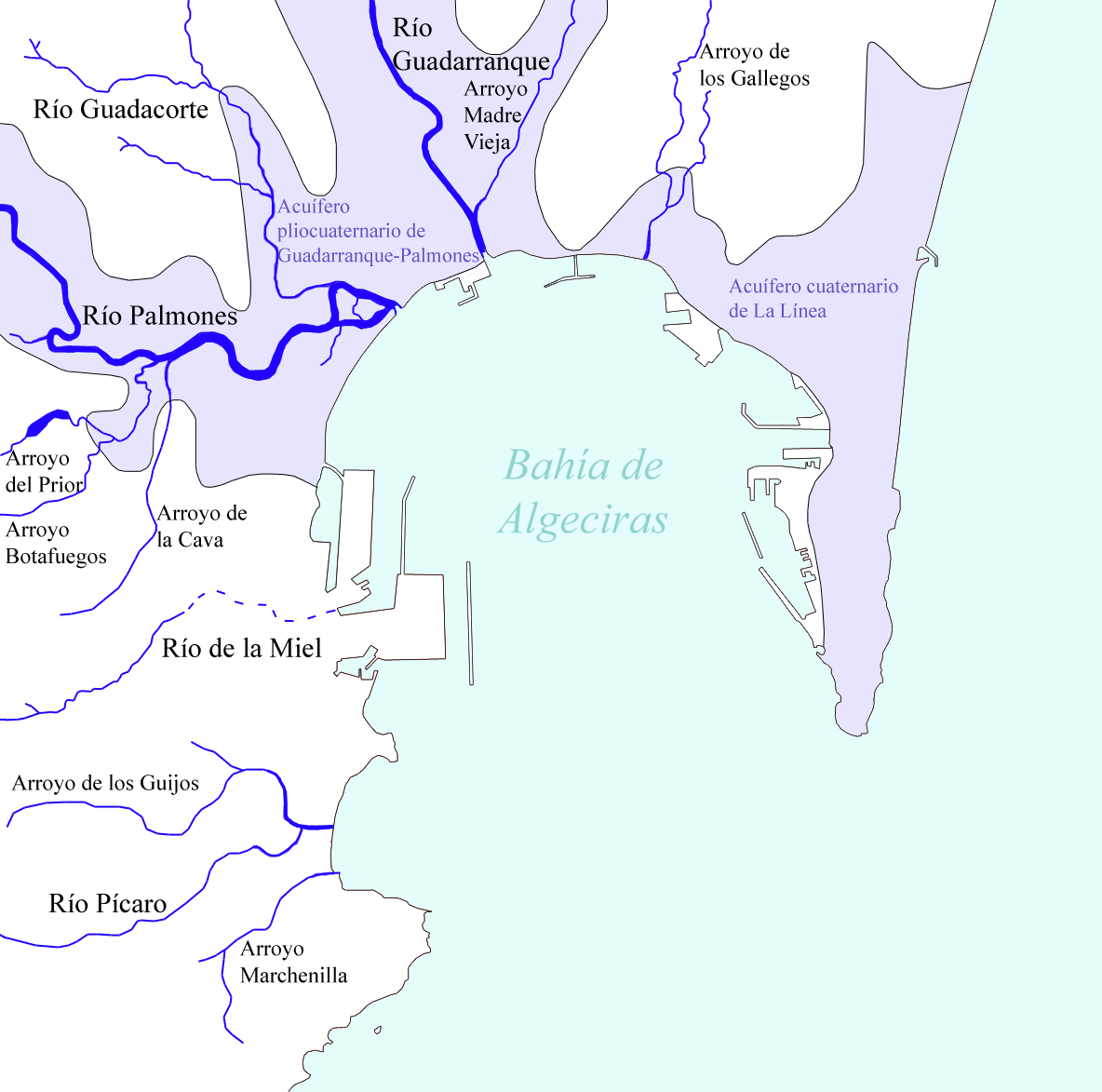 Mapa indicativo de los cursos fluviales y acuíferos de la bahía de Algeciras